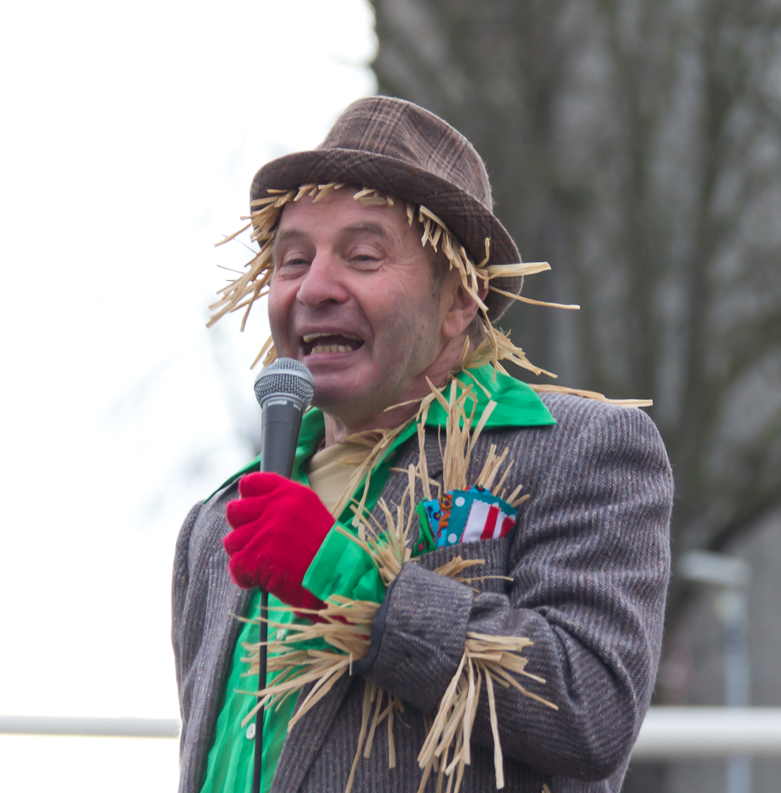 Gedenkfeier von „Köln kann auch anders“ zum 5. Jahrestag des Einsturzes des Historischen Archivs der Stadt Köln. Doro Egelhaaf und Didi Jünemann nehmen in einem Sketch aus der Stunksitzung den Einsturz kabarettistisch aufs Korn. Foto: Didi Jünemann als „Nubbel“